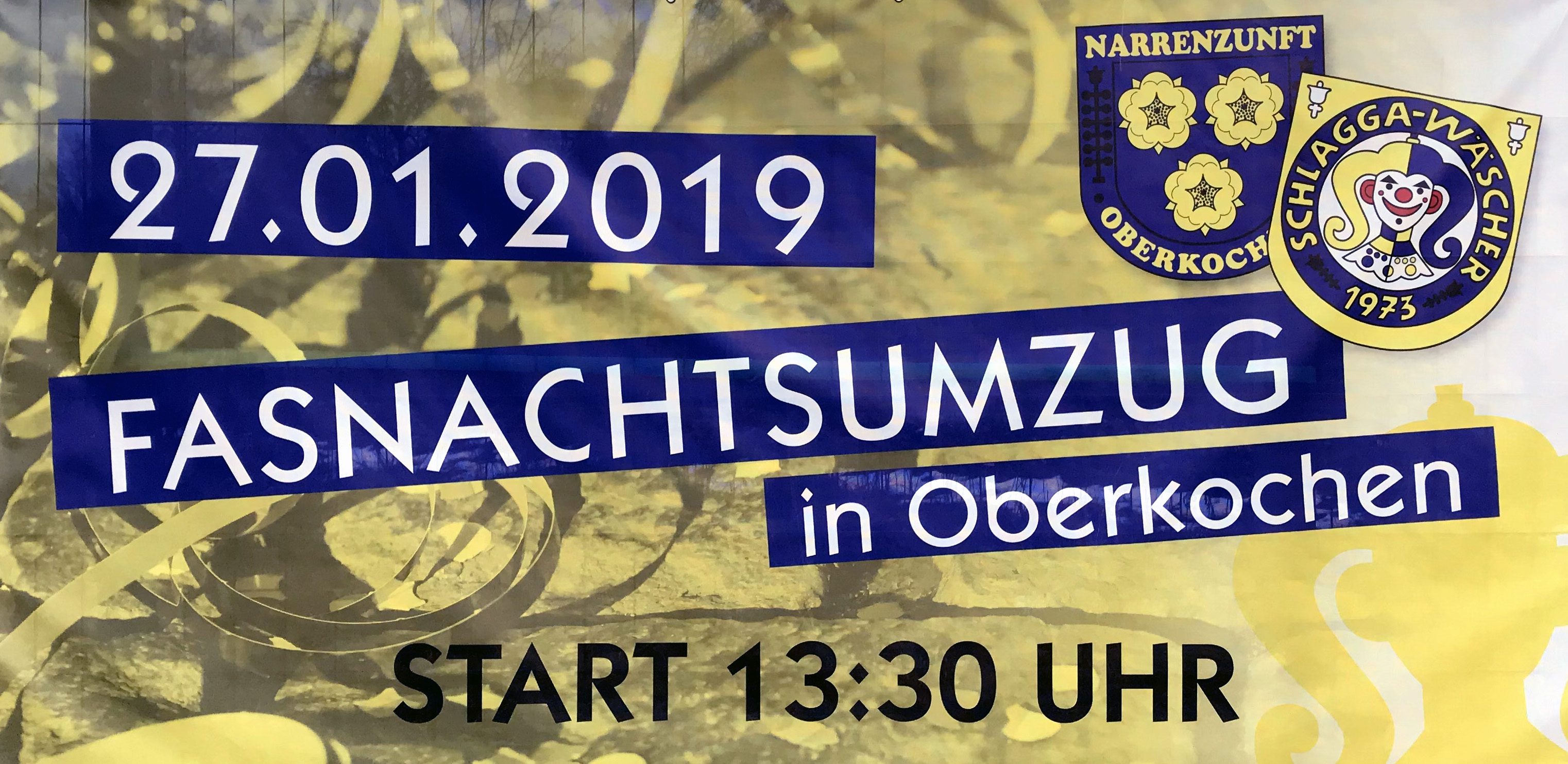 Der Oberkochener Fastnachtsverein wurde 1973 gegründet. Auf dem Plakat sieht man den "Schlagg", seine wichtigste Symbolfigur.